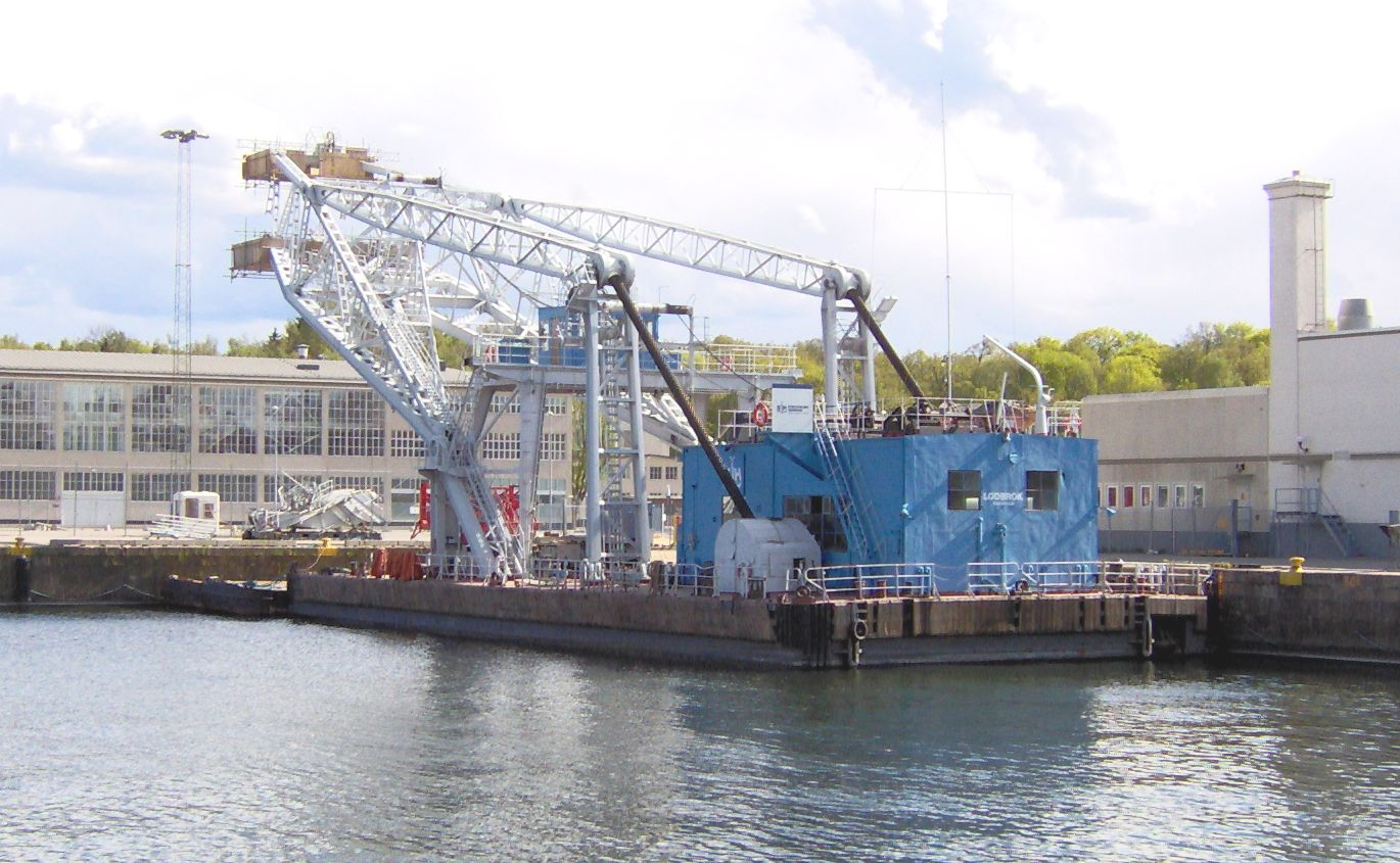 Lodbrok repareras i Stockholm. Lodbrok, the big crane built on a poonton, under repair in Stockholm, Sweden. 2006.